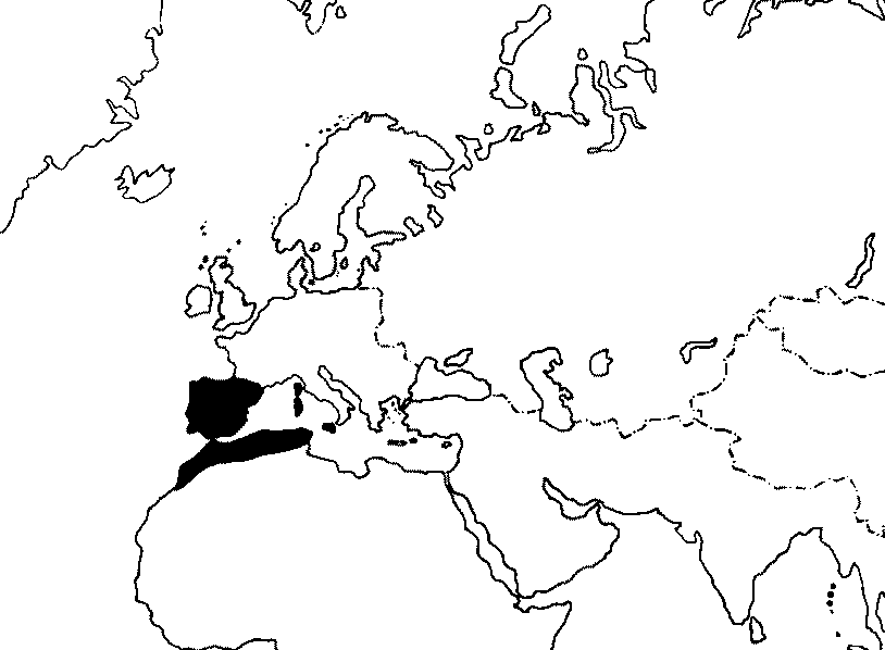 Het oorspronkelijke verspreidingsgebied van de zwarte spreeuw, Sturnus unicolor.